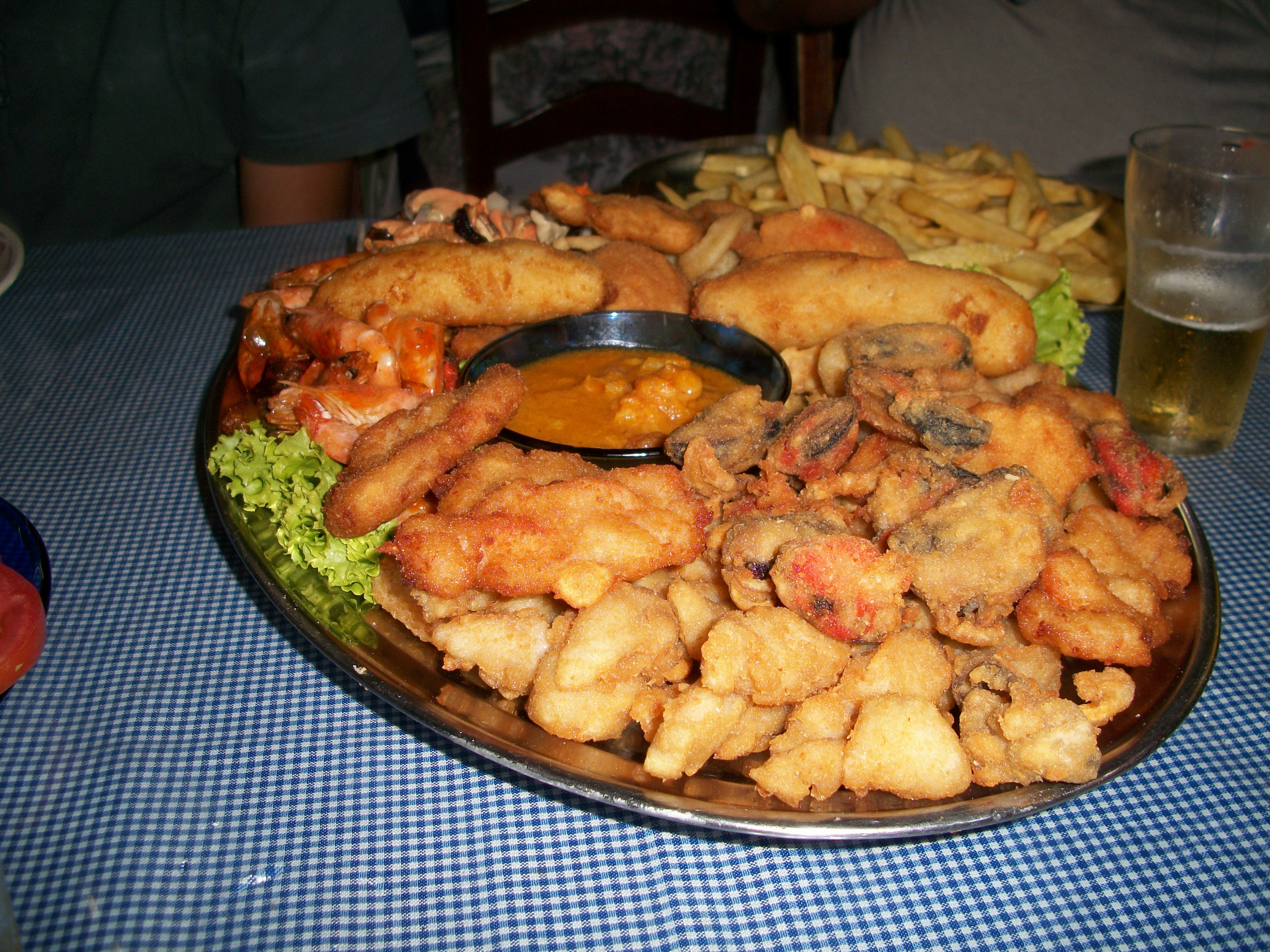 Gastronomia